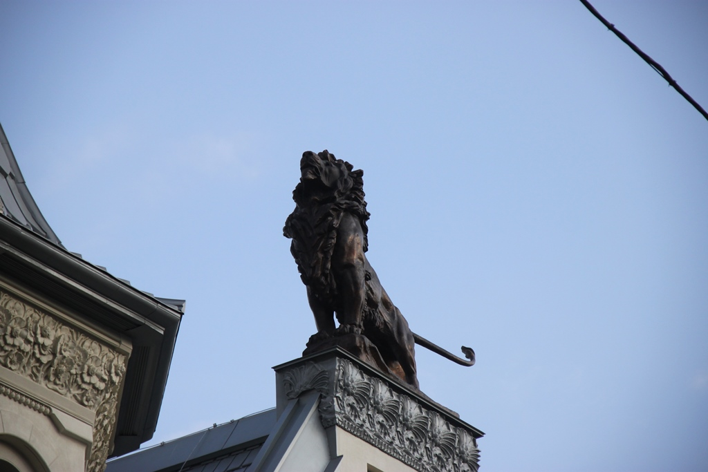 Дом Кекушева на Остоженке, 21. Утраченная много десятилетий назад статуя льва - автограф архитектора - вернулась на место.